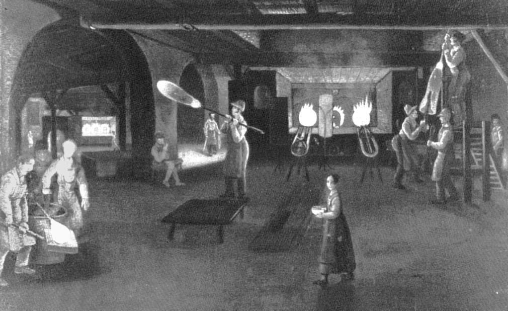 Tafelglasmacher in der Glashütte Grünenplan